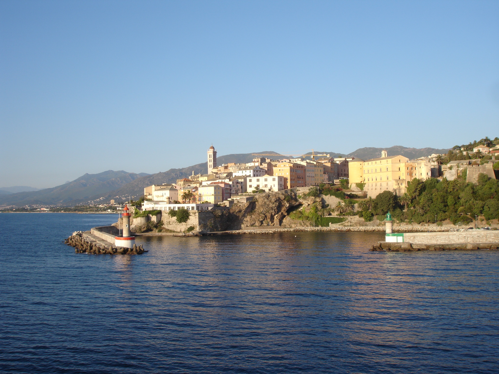 France, Haute-Corse (2B), Bastia, entrée du vieux port